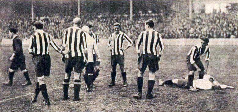 Finale de football aux JO de 1920 Belgique-Tchécoslovaquie, le gardien tchèque est KO.